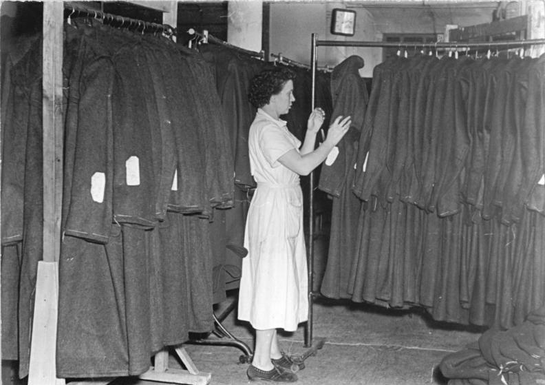 Zentralbild-Illner Zi-Bed. 13.10.1953 So wird der neue Kurs verwirklicht. VEB Leipziger Bekleidungswerks fertigen preiswerte Trenchcoats. Zu den großen Betrieben Leipzigs, die durch die neuen Maßnahmen unserer Regierung in verstärktem Maße Massenbedarfsartikel herstellen, zählt der VEB Leipziger Bekleidungswerk. Als bemerkenswerte Neuheit entwickelte der Betrieb eine Art von Trenchcoats aus khakifarbigem Stoff. Dieser Mantel ist bedeutend billiger als ein Gabardinenmantel und erfüllt alle Anforderungen, die an einen Trenchcoat gestellt werden. UBz.: Auf fahrbaren Kleiderständern hängen fertige Lodenmäntel.